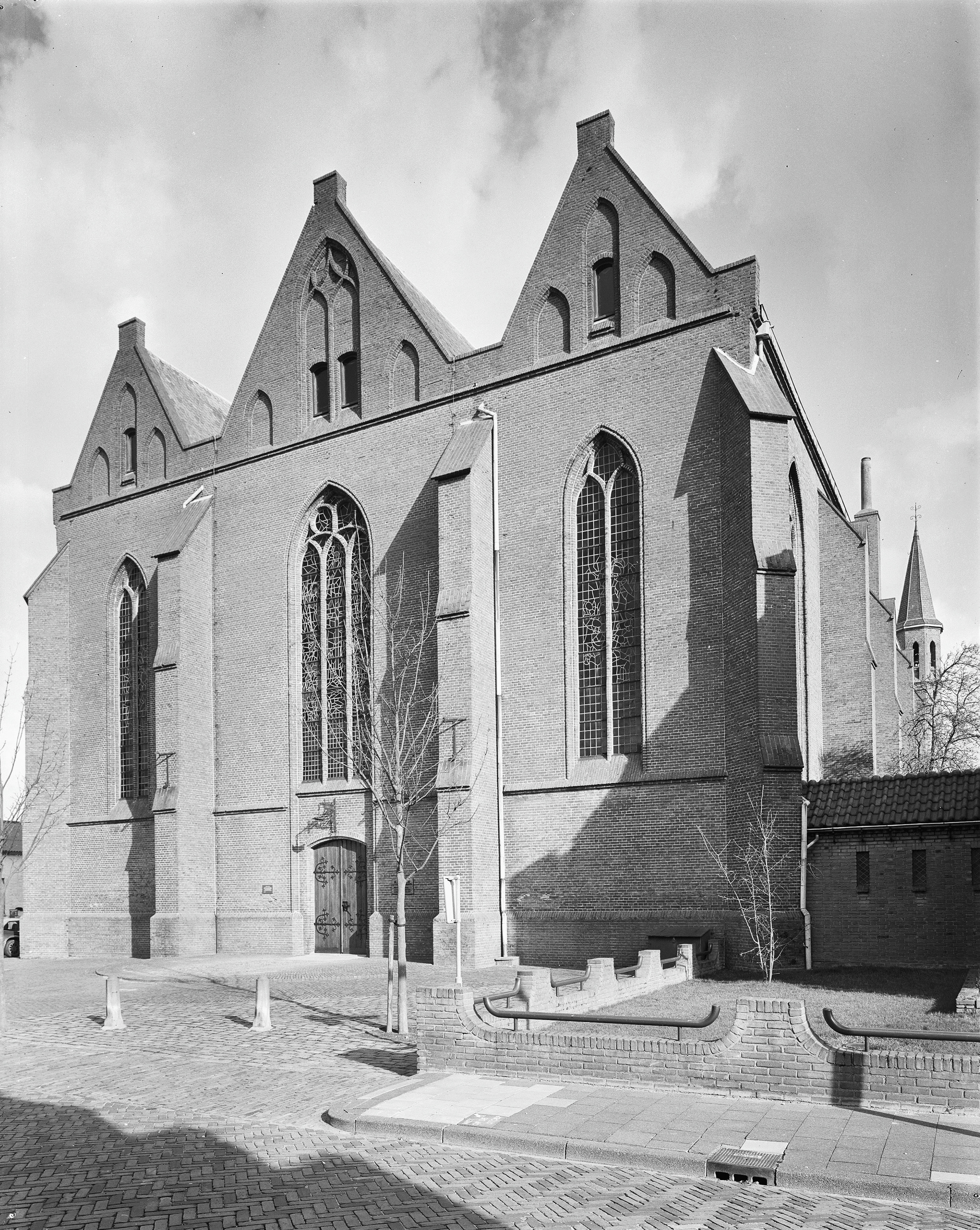 ROOMS-KATHOLIEKE KERK: Exterieur WESTGEVEL